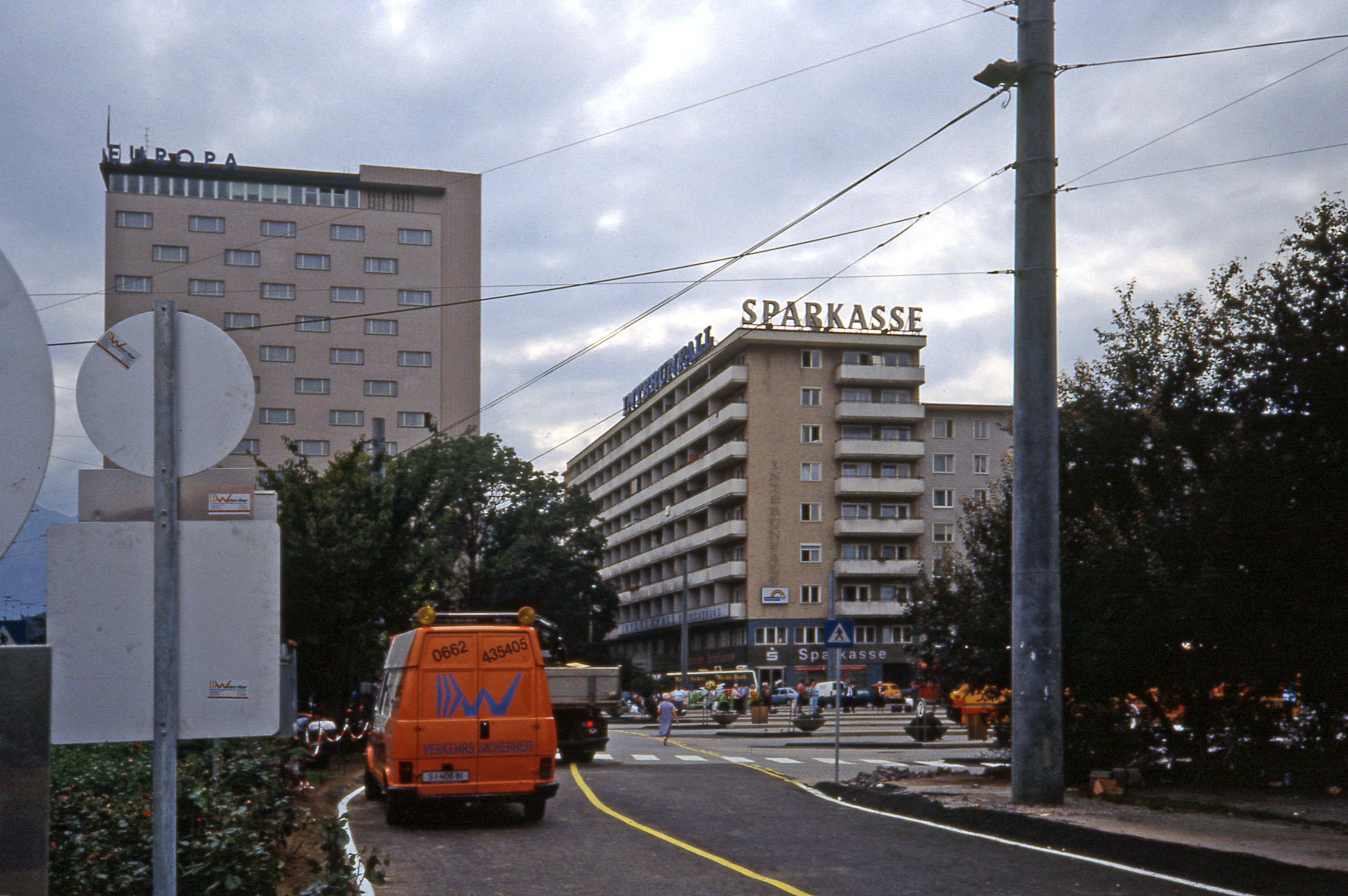 Salzburg (Mitte 1992): Blick zum Südtirolerplatz, dem Vorplatz des Hauptbahnhofs; links: Hotel Europa, recchts die früher hier befindlichen Bussteige für Regionalbusse; dahinter ein Wohngebäude mit einer Filiale der Salzburger Sparkasse im Erdgeschoß; im Vordergrund ersichtlich die bis 1995 in Österreich übliche Straßenmarkierung in gelber Farbe.